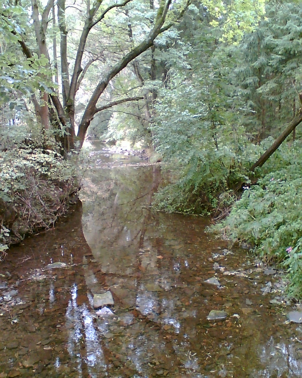 FFH 4023-332